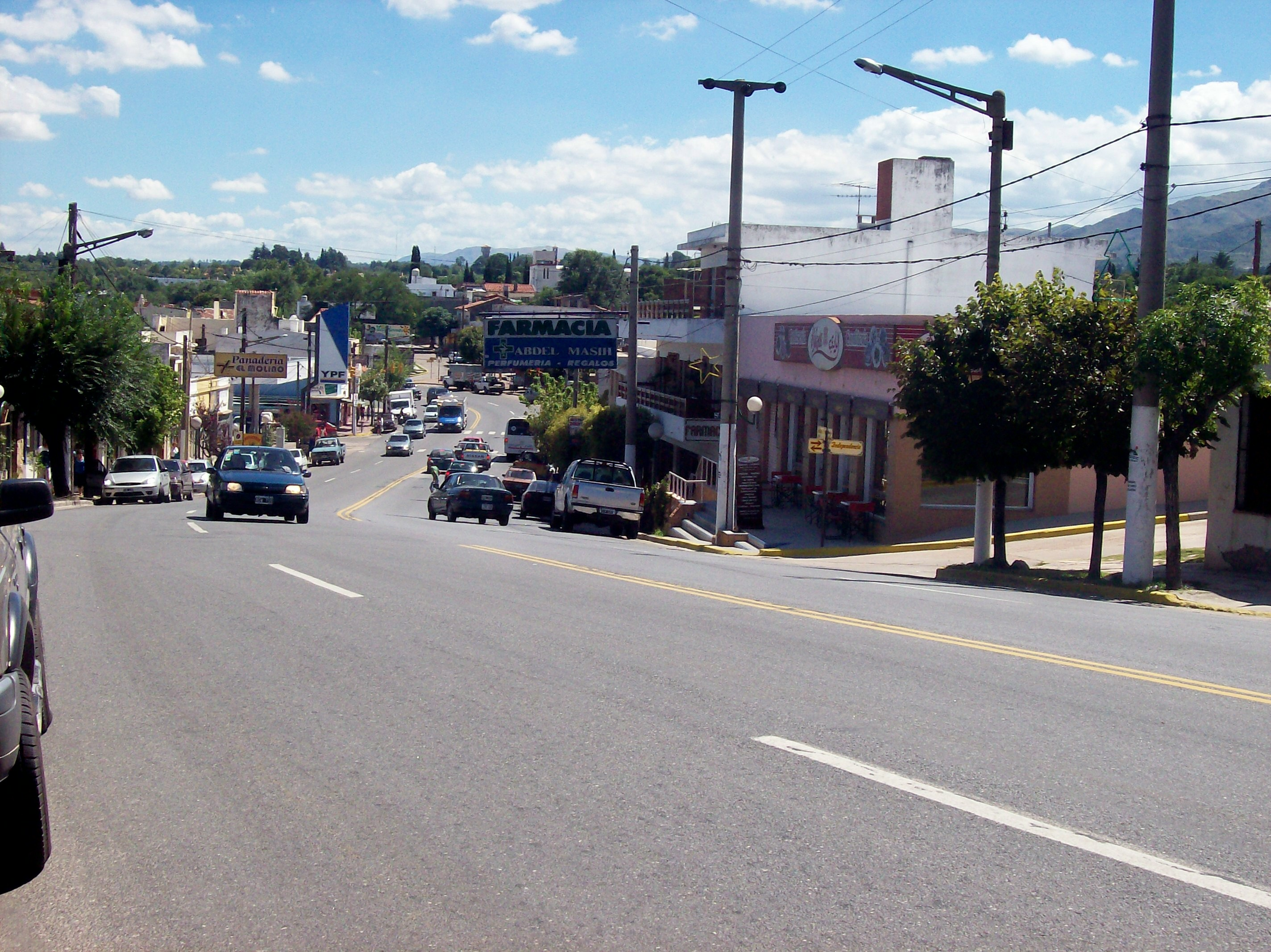 Ruta Nacional 38 en su intersección con Independencia (extensión imaginaria de la calle C. de la Barca),en el barrio de San Antonio, en Valle Hermoso, Pcia. de Córdoba, Argentina. Foto tomada de S a N, desde cerca de la intersección con A. Sabattini